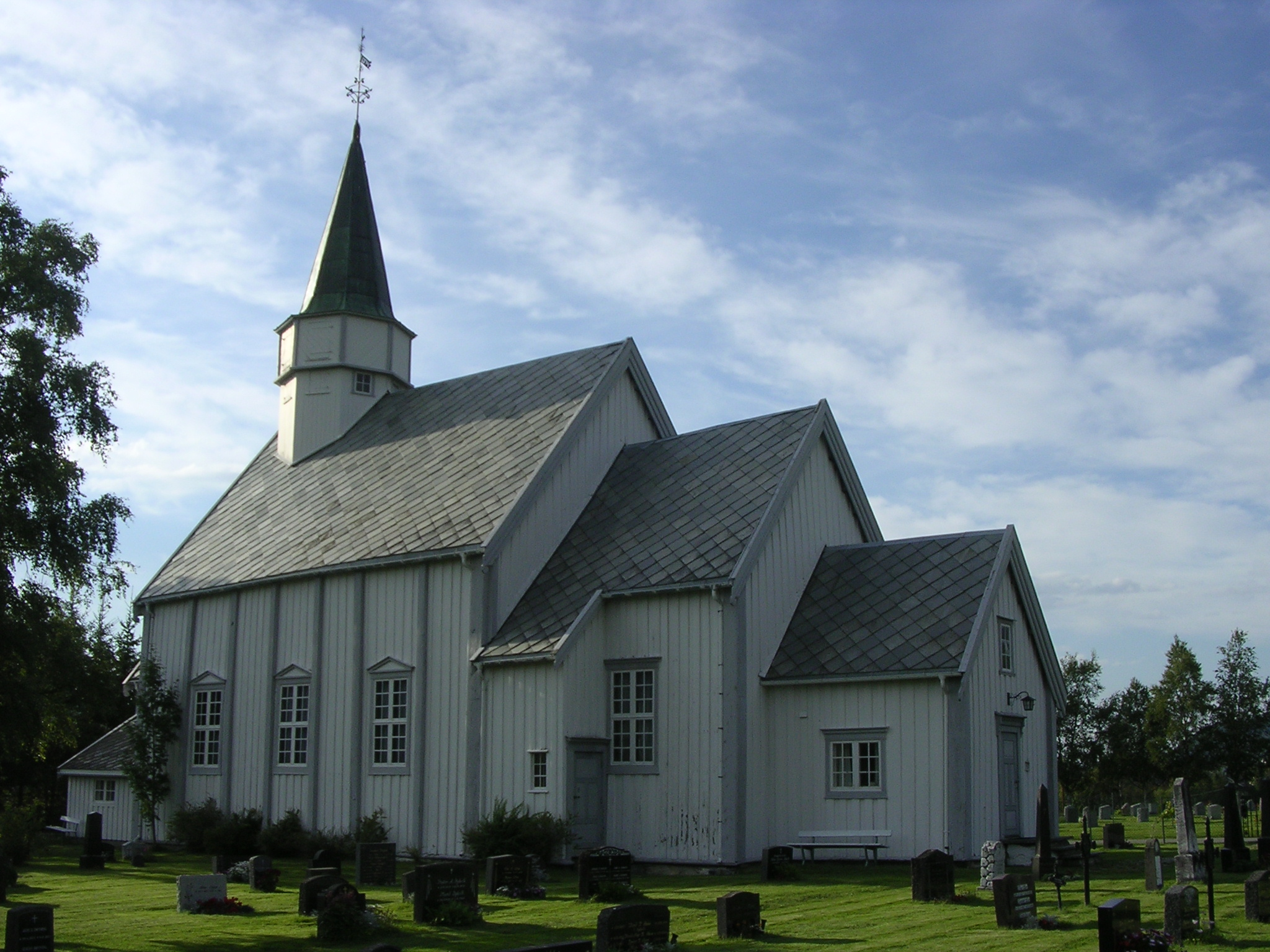 Flå kirke i Melhus kommune, Sør-Trøndelag